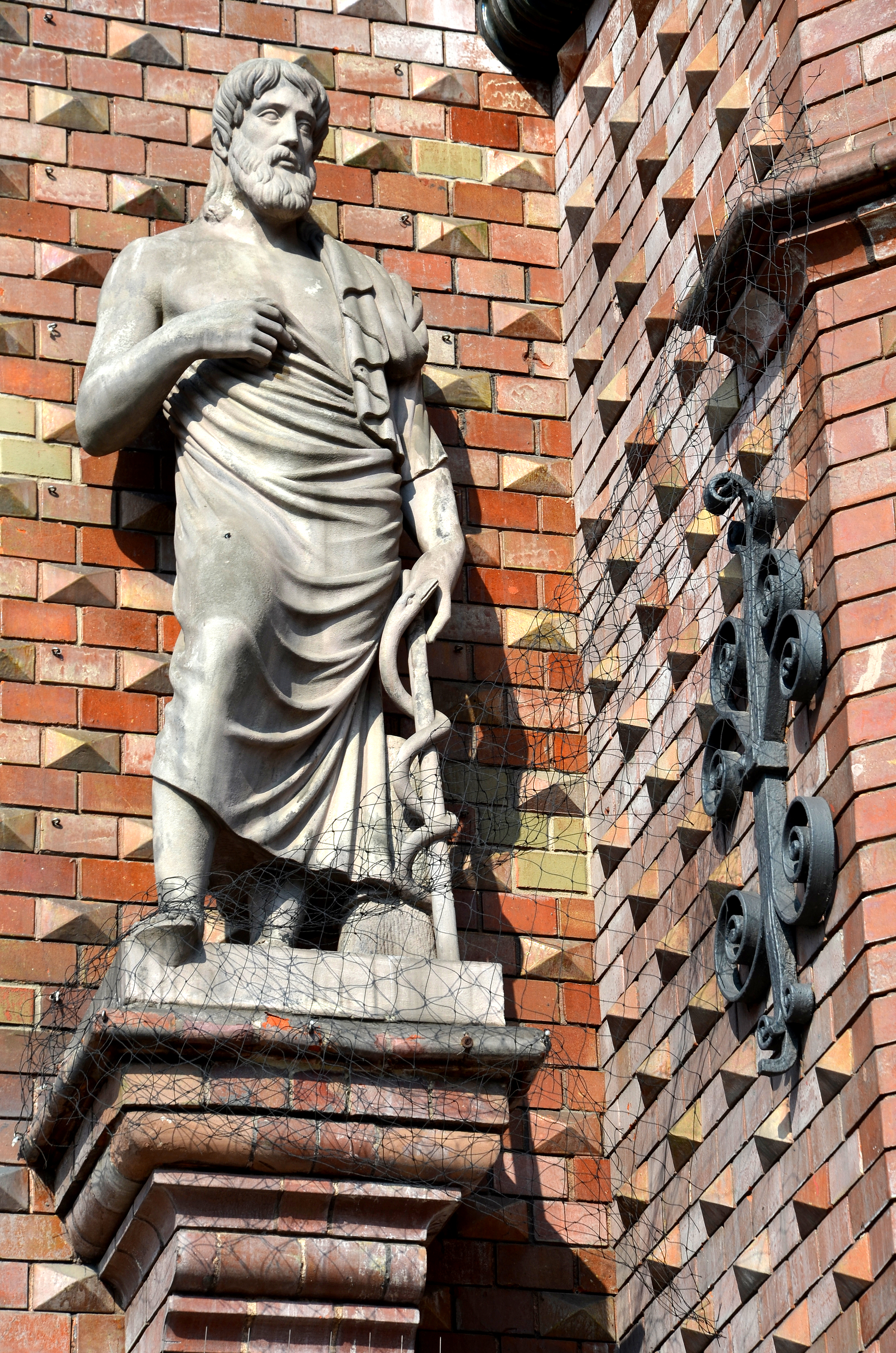 Standbild des griechischen Arztes Hippokrates, das der hannoversche Hofbildhauer Bernhard Wessel 1830 ursprünglich für den Vorgängerbau der von August Heinrich Andreae errichteten Ratsapotheke geschaffen hatte ...